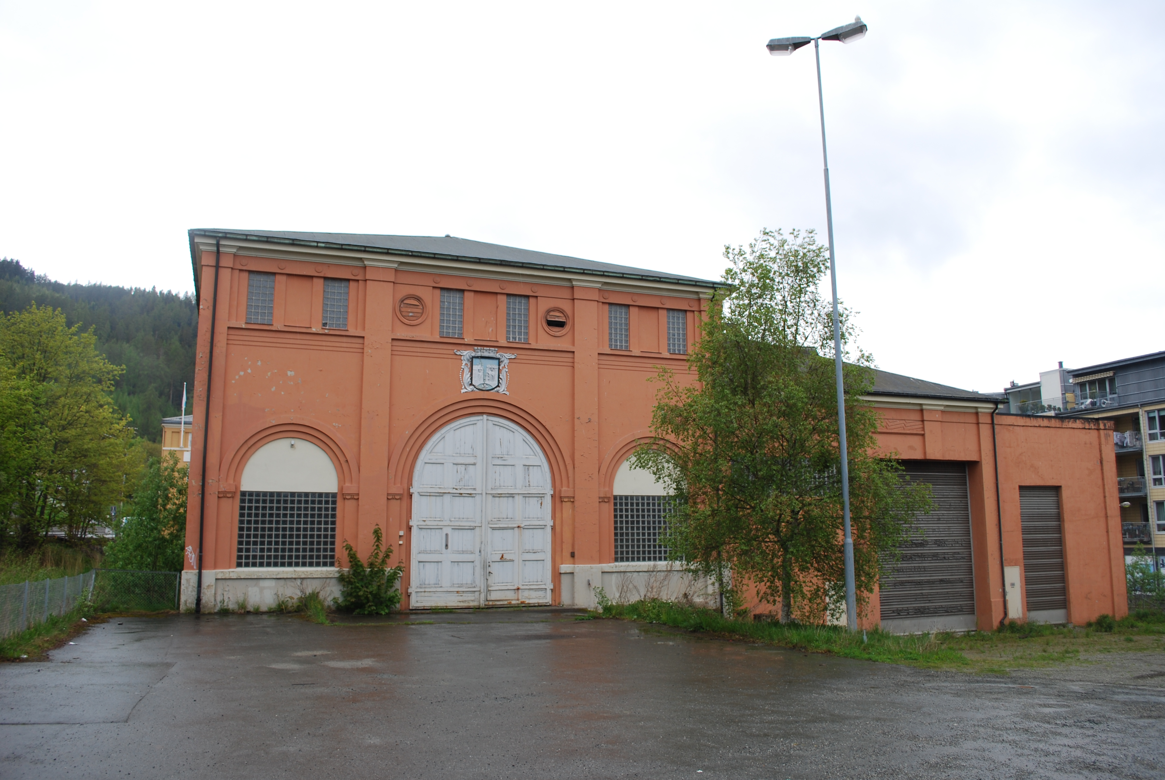 Reservekraftverket i Ilsvika / Dampsentralen i Ilsviken i Trondheim.